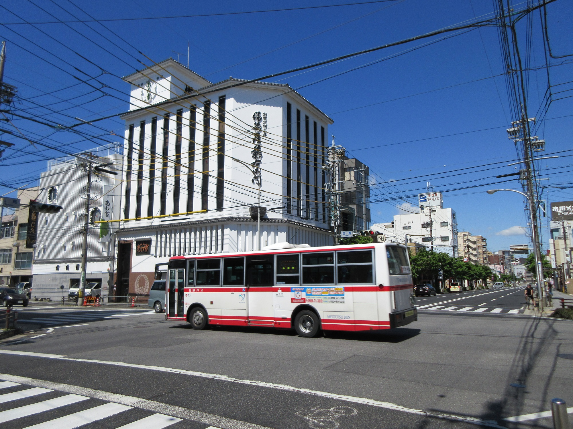 岡崎市、伝馬交差点